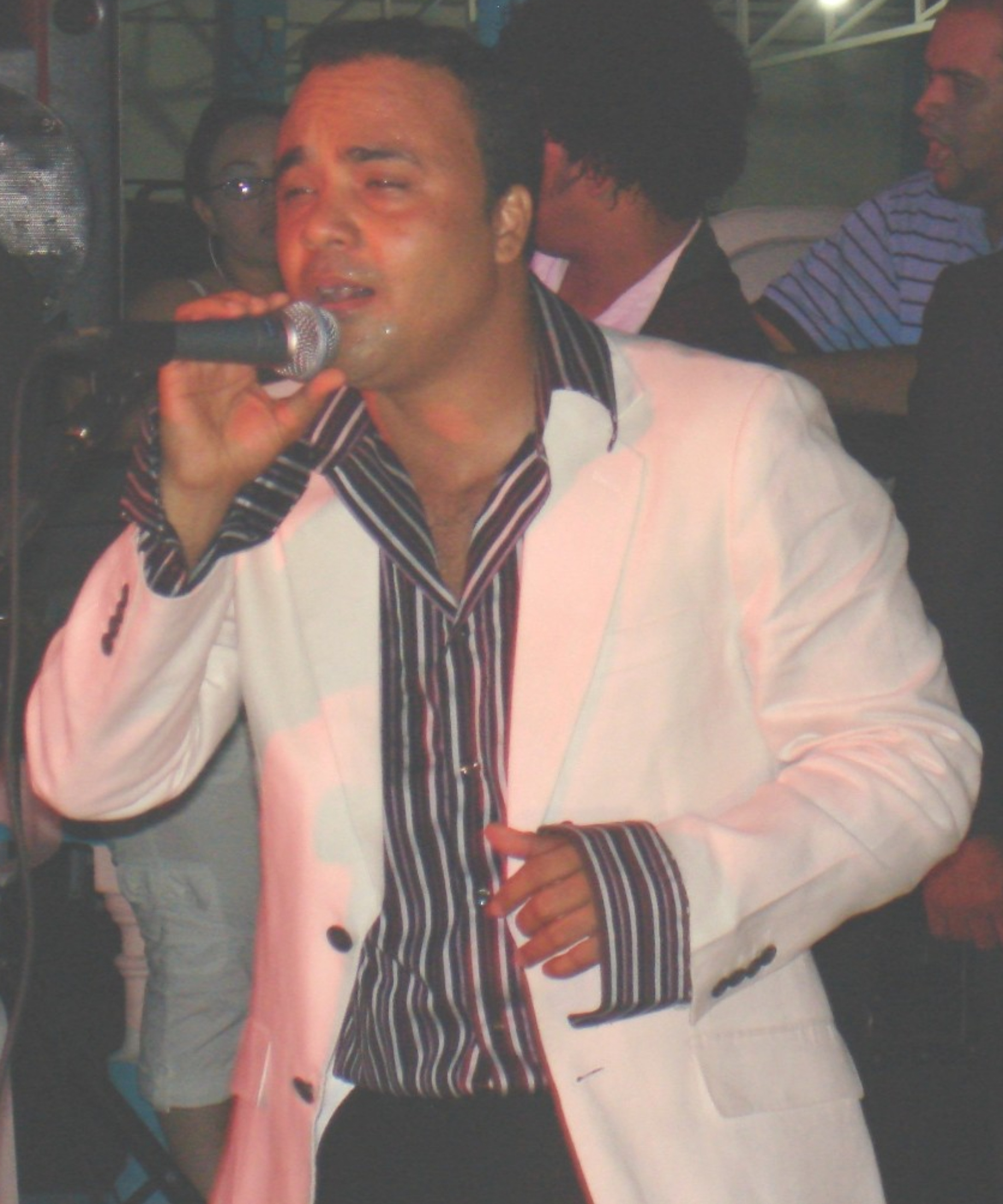 Zacarías Ferreira en concierto.